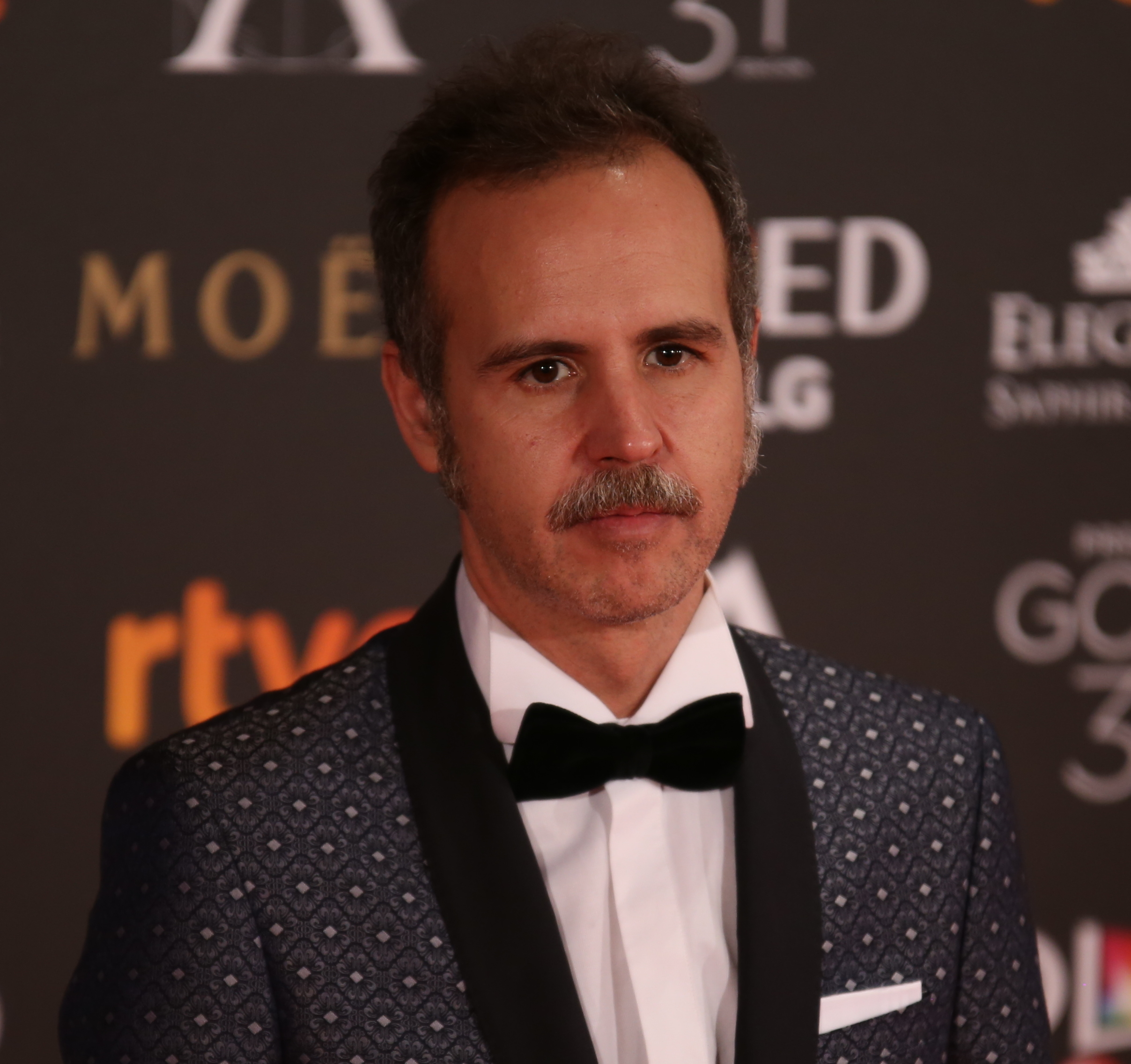 Premios Goya 2017